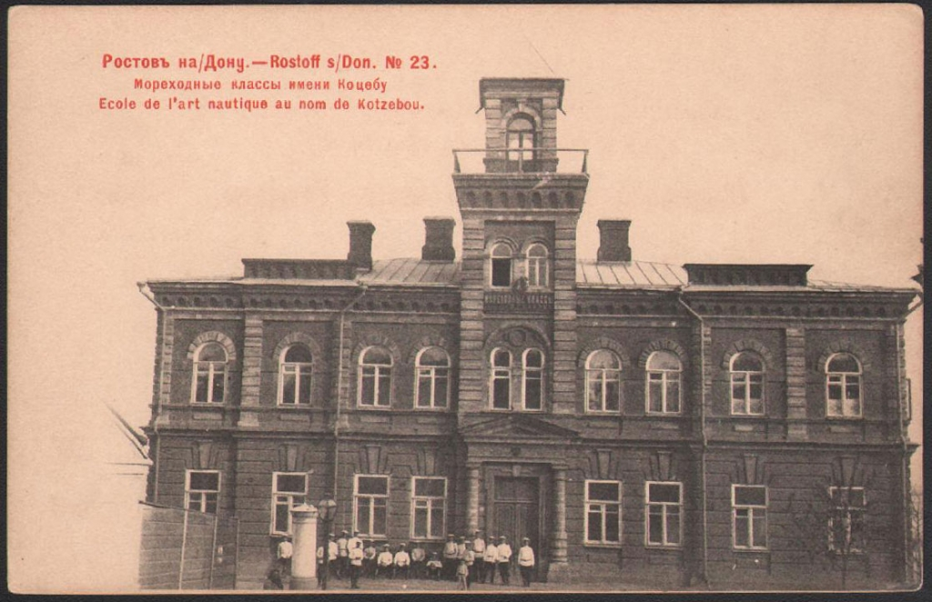 Здание ростовских мореходных классов на дореволюционной открытке